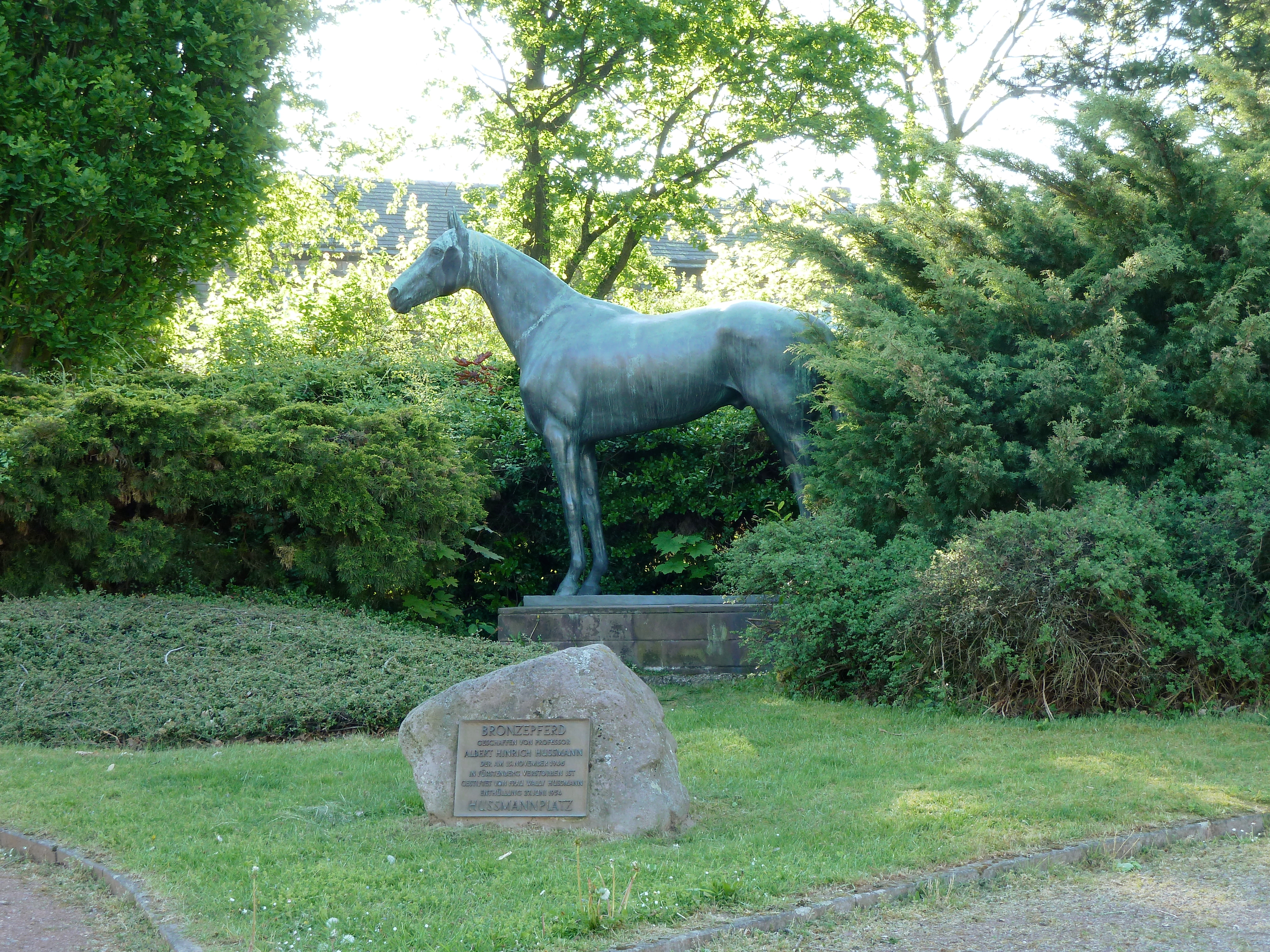 Hussmannplatz in Fürstenberg an der Weser, Landkreis Holzminden, Südniedersachsen. Mit Bronzestatue eines Pferdes, geschaffen von Albert Hinrich Hussmann (1874-1946), gestiftet von seiner Witwe Wally Hussmann, enthüllt am 27. Juni 1954